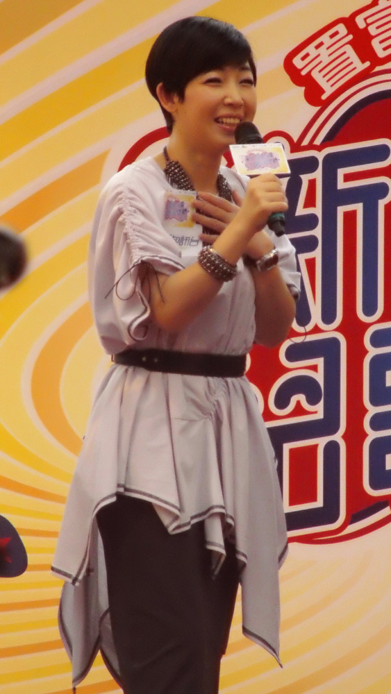 中文（香港）: 黎芷珊的樣子